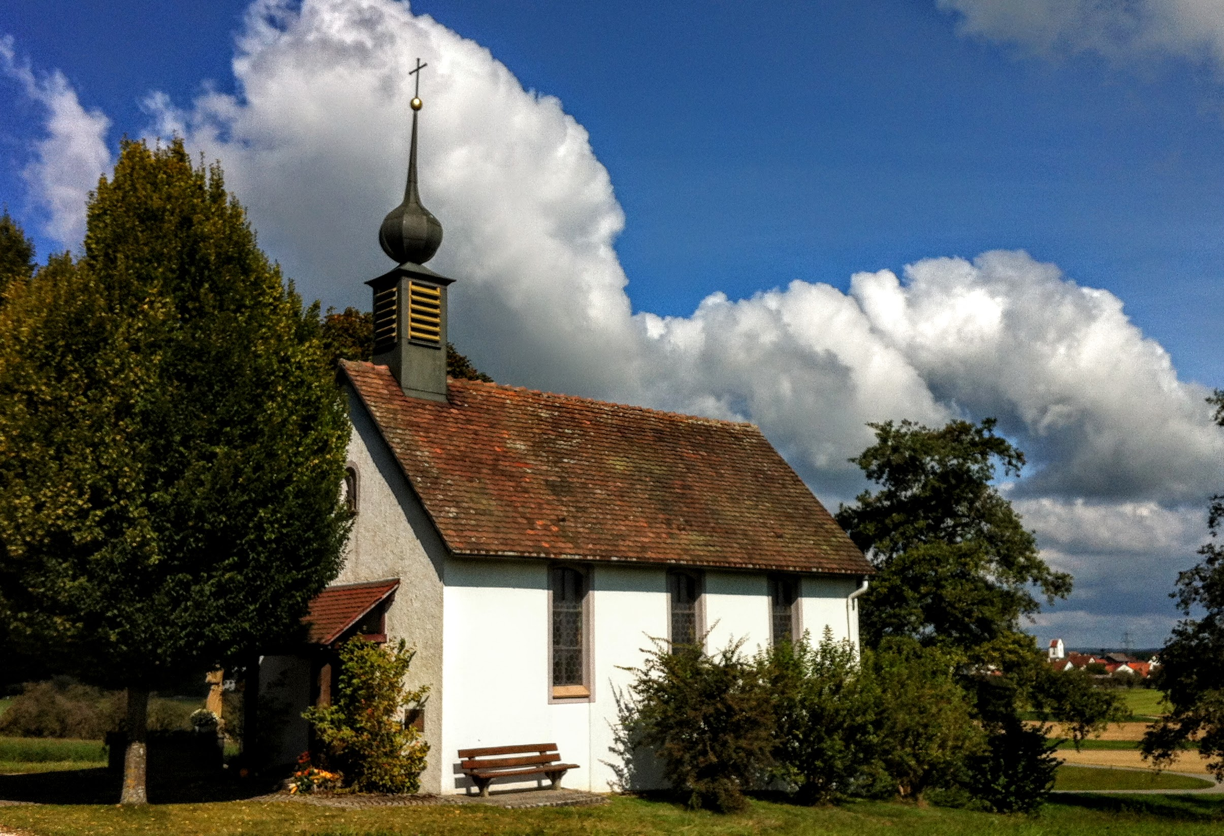 Deutschland (D) - Baden-Württemberg (BW) - Landkreis Konstanz (KN) - Mühlingen, Ortsteil Hecheln: St. Wendelin-Kapelle